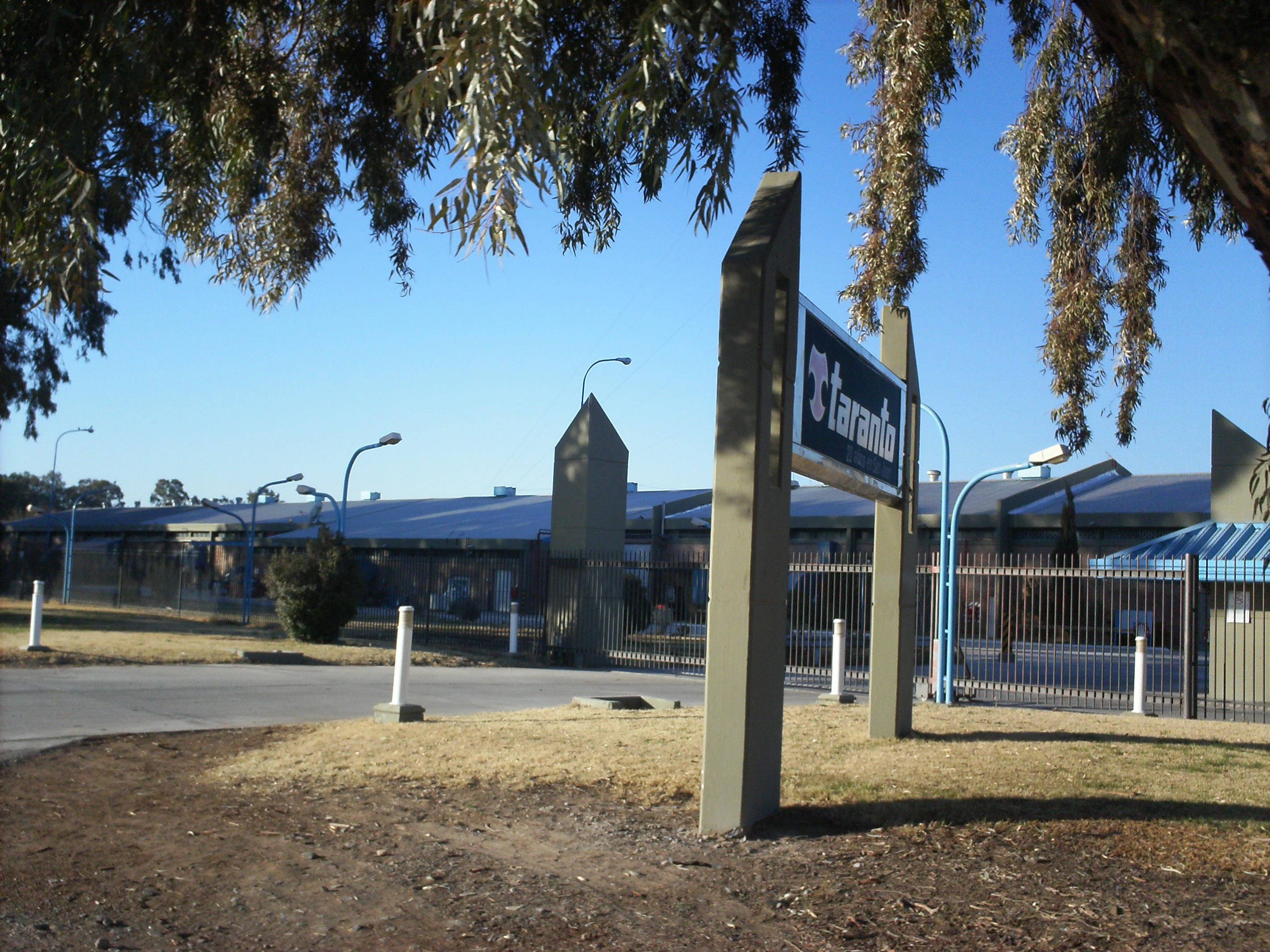 la fabrica de productos alimenticios en frente de esta localidad e 9 de julio